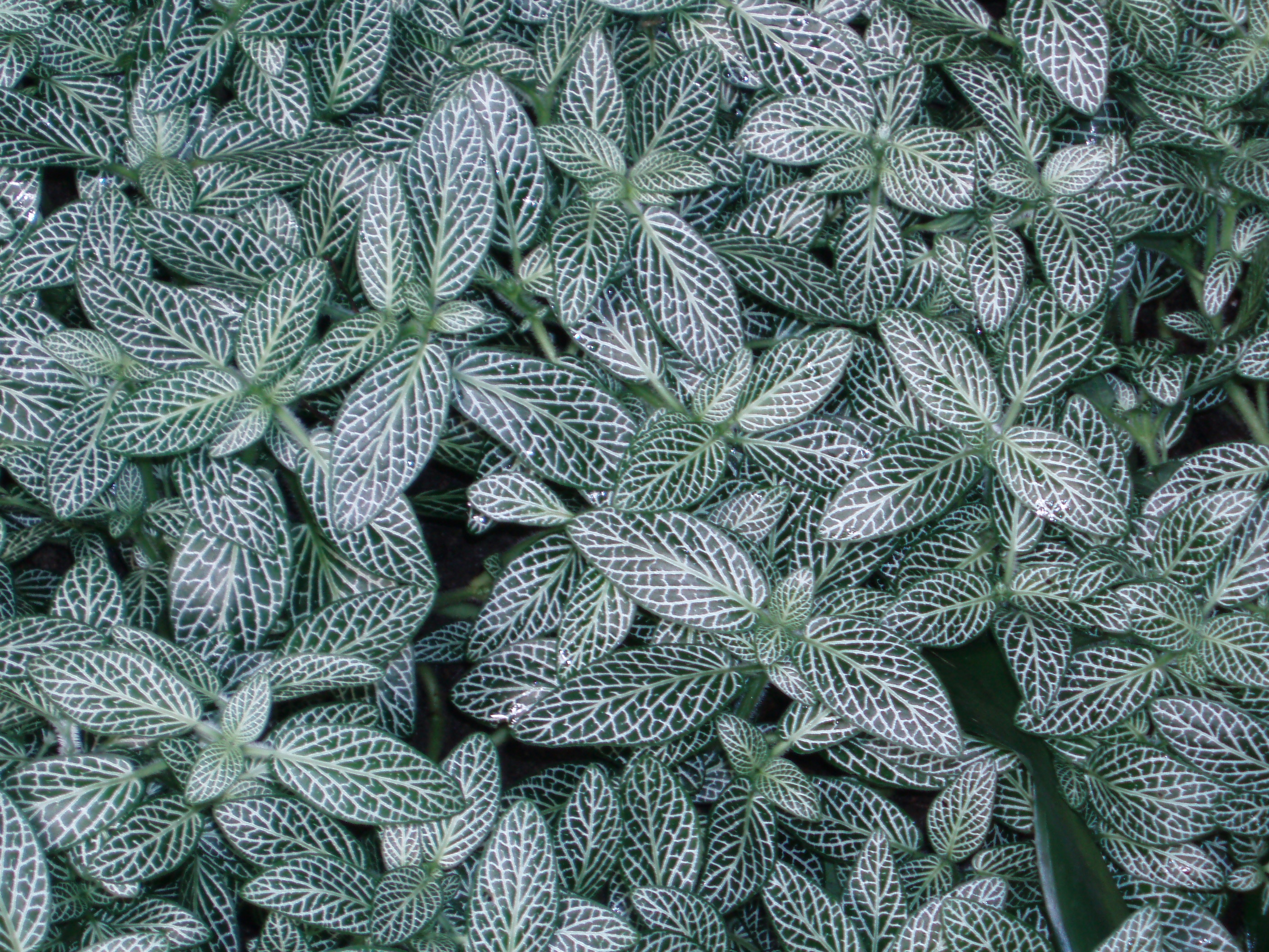 Fittonia albivenis, im Gewächshaus im Egapark in Erfurt; ausgezeichnet als Fittonia verschaffeltii